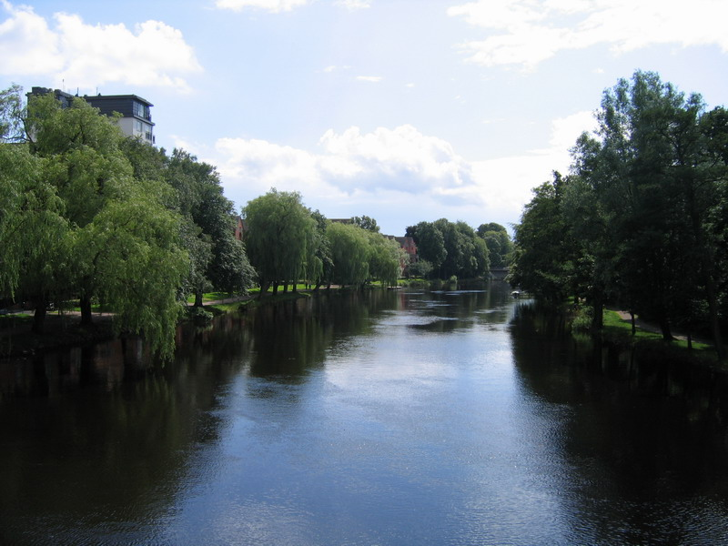 Ängelholm Rönne å